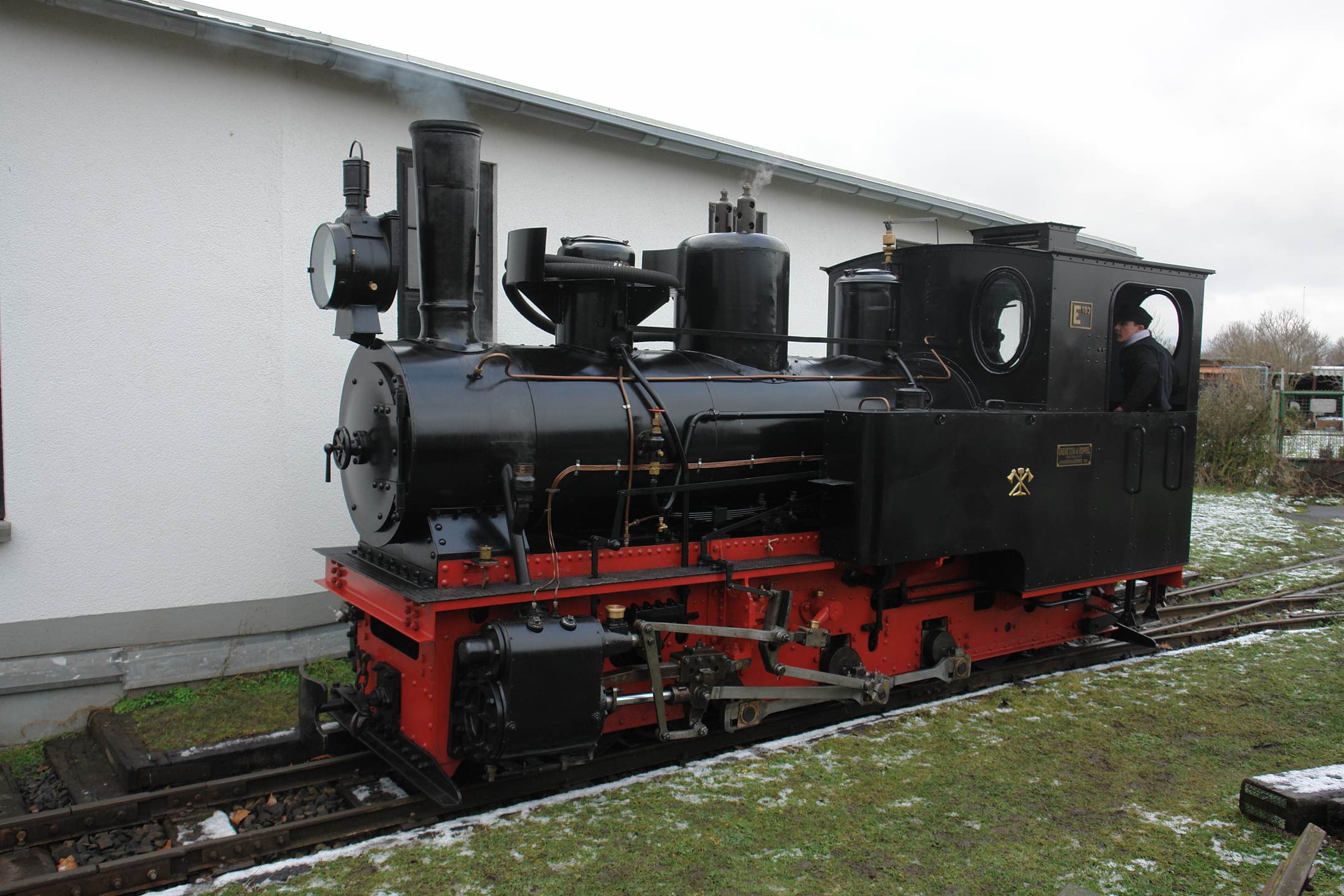 Frankfurter Feldbahnmuseum, 4. Januar 2015